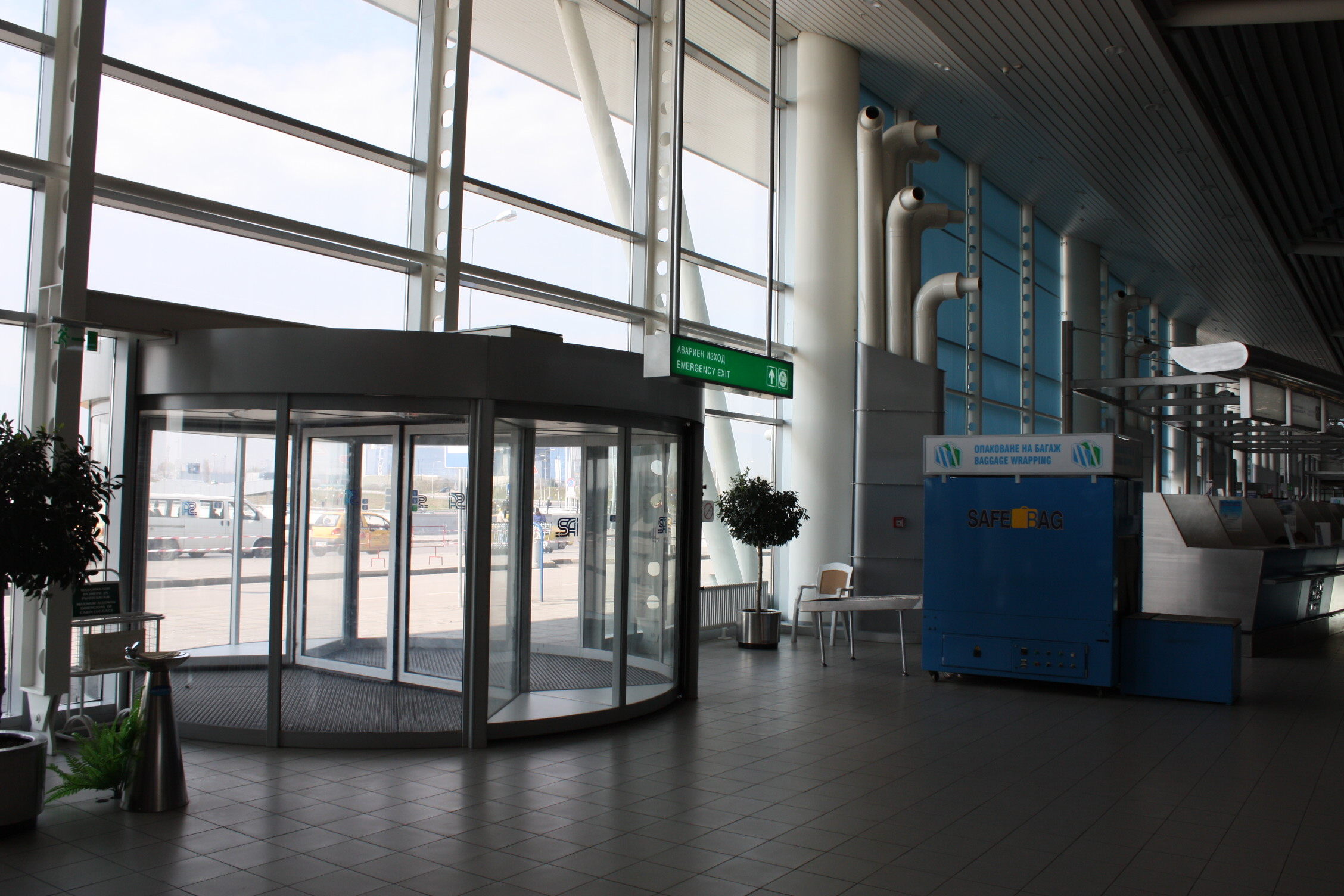 Sofia Airport, Bulgaria